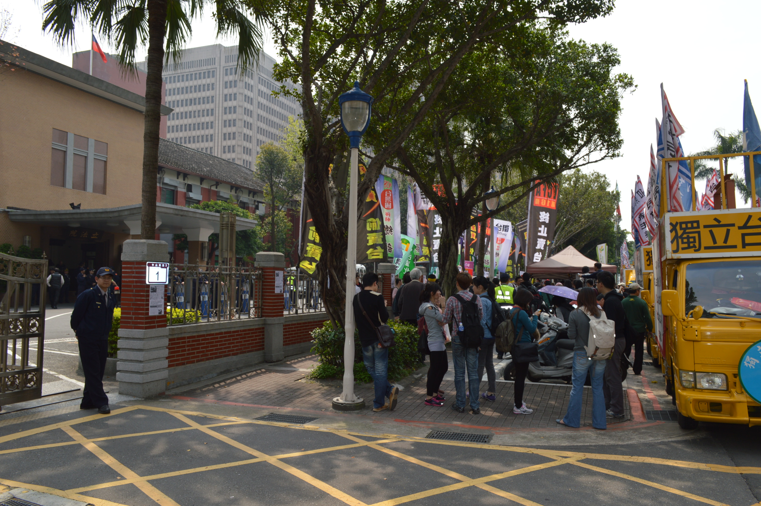 3月18日立法院外抗議“服貿”的社團在集結。